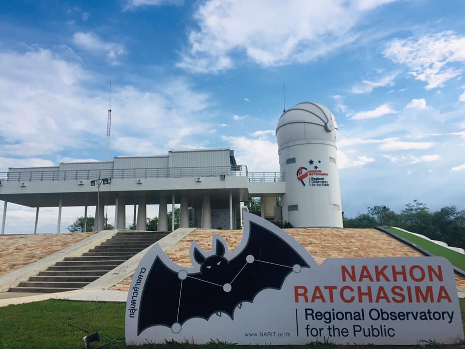 หอดูดาวเฉลิมพระเกียรติ 7 รอบ พระชนมพรรษา นครราชสีมา หอดูดาวภูมิภาคสำหรับประชาชนเต็มรูปแบบแห่งแรกของไทย